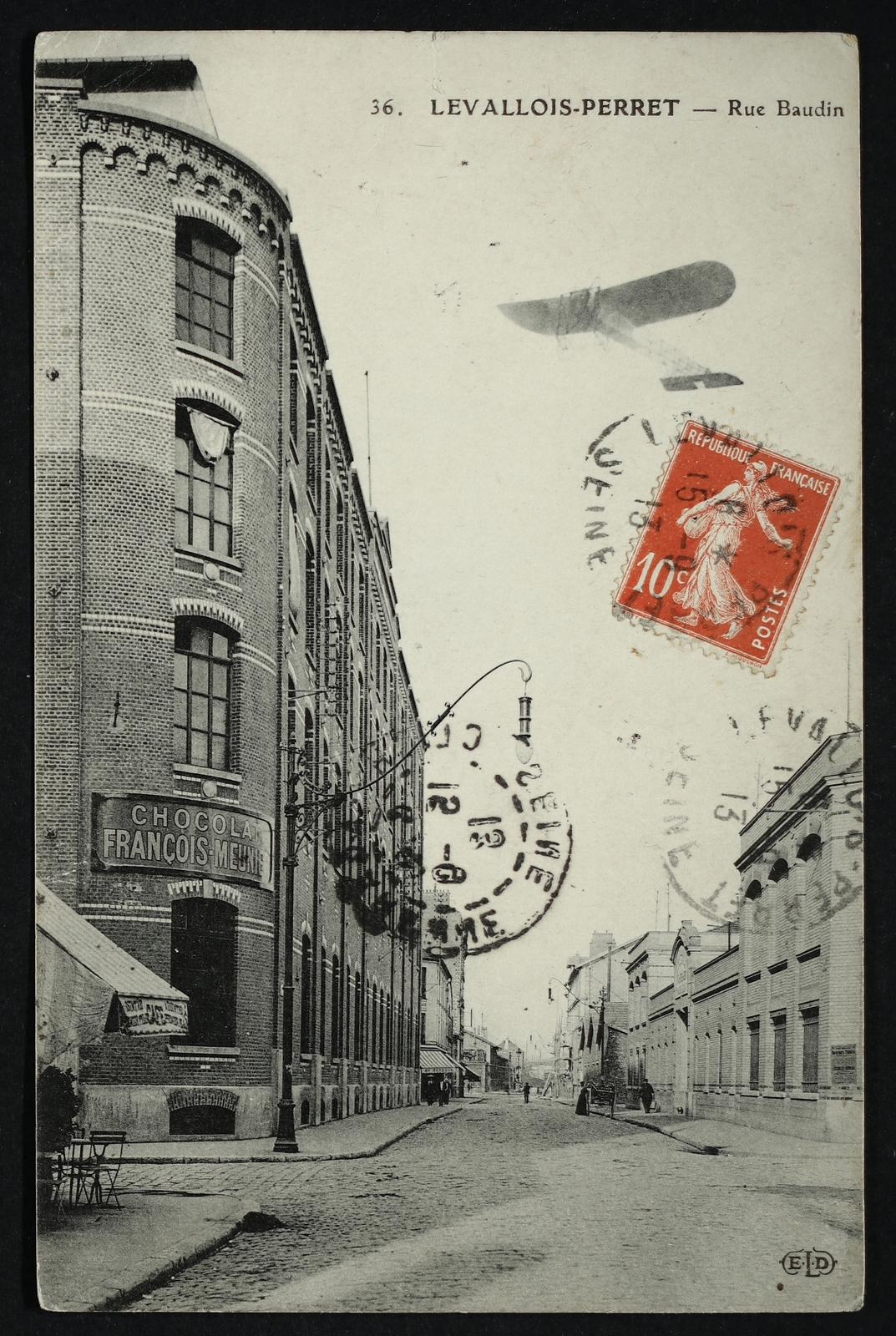 Levallois-Perret.Rue Baudin.Aéroplane